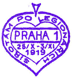 Почтовый штемпель Чехословакии, применявшийся для гашения марок из "легионерской" серии